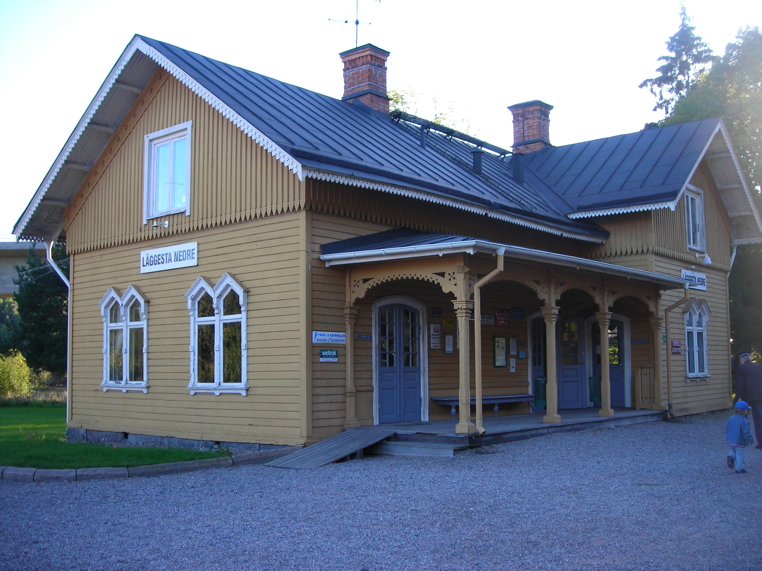 Foto: Daniel S.